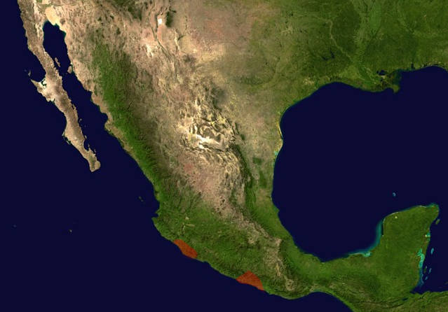 Distribution of Brachypelma smithi in Mexico.